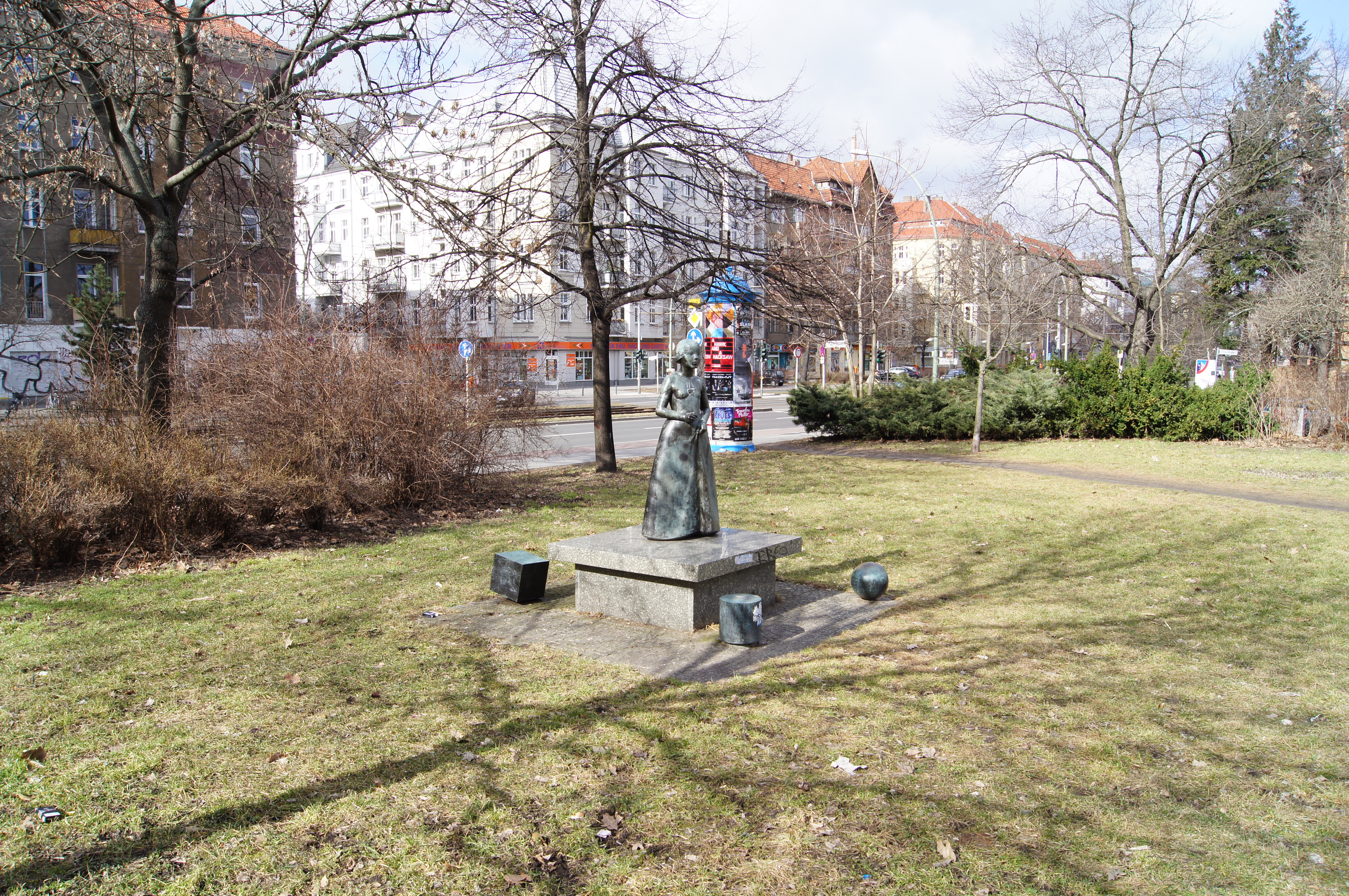 Michael Klein 1980/82: „Debütantin“. Für Friedrich-Wilhelm-August Fröbel. Eine 150 cm hohe bronzene Frauenfigur steht auf einem Granitsockel. Auf dem Boden vor den Ecken des Postaments liegen die von Fröbel favorisierten Spielelemente Kubus, Zylinder, Kugel. Standort: Fröbelplatz, Berlin-Prenzlauer Berg